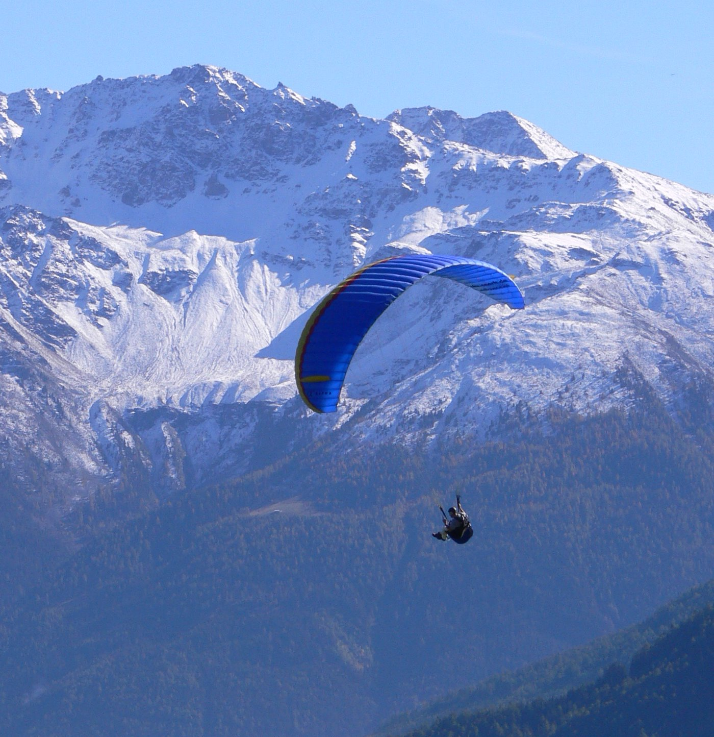 Gleitschirmflieger vor der Ortlergruppe